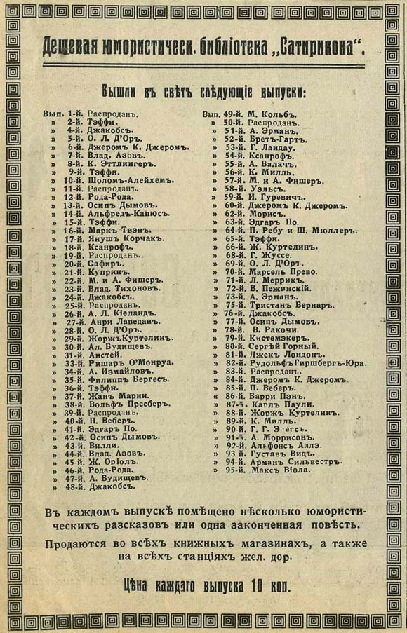 Список выпусков "Дешевой юмористической библиотеки Сатирикона", около 1912 г., Россия